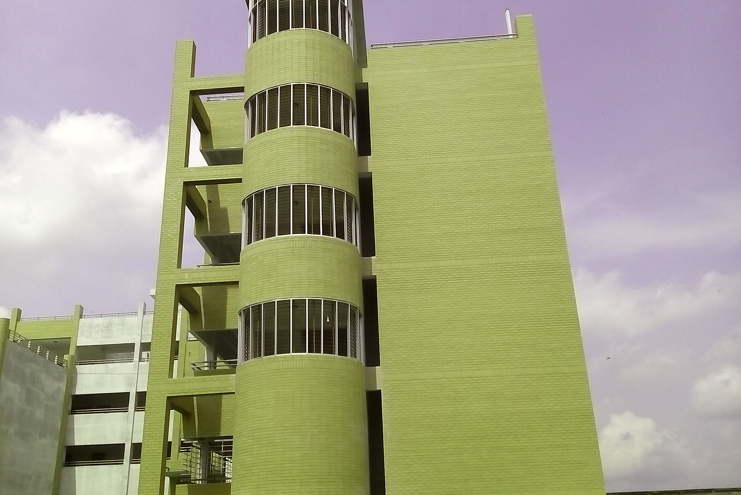 নাটোর টেক্সটাইল ইন্সটিটিউট